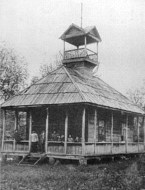 Старая мечеть в ауле Большой Кичмай